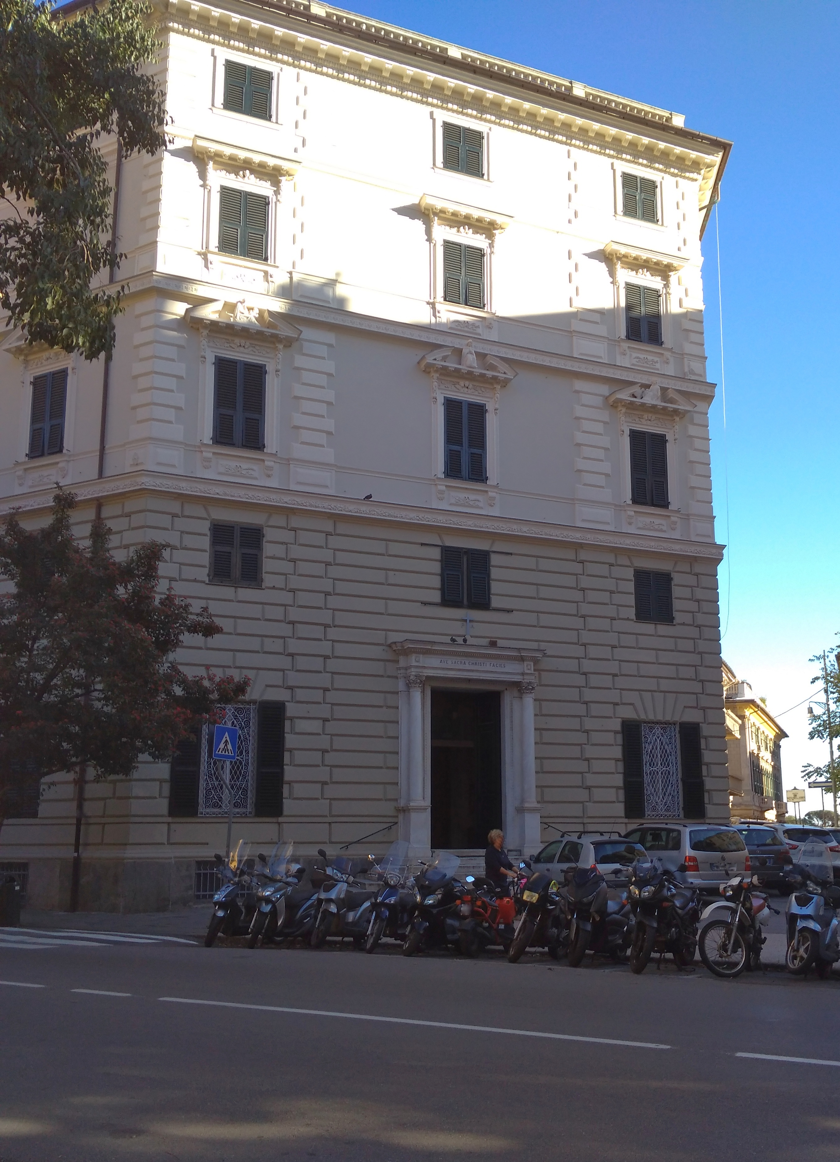 Genova, quartiere di Castelletto, facciata della chiesa di San Bartolomeo degli Armeni